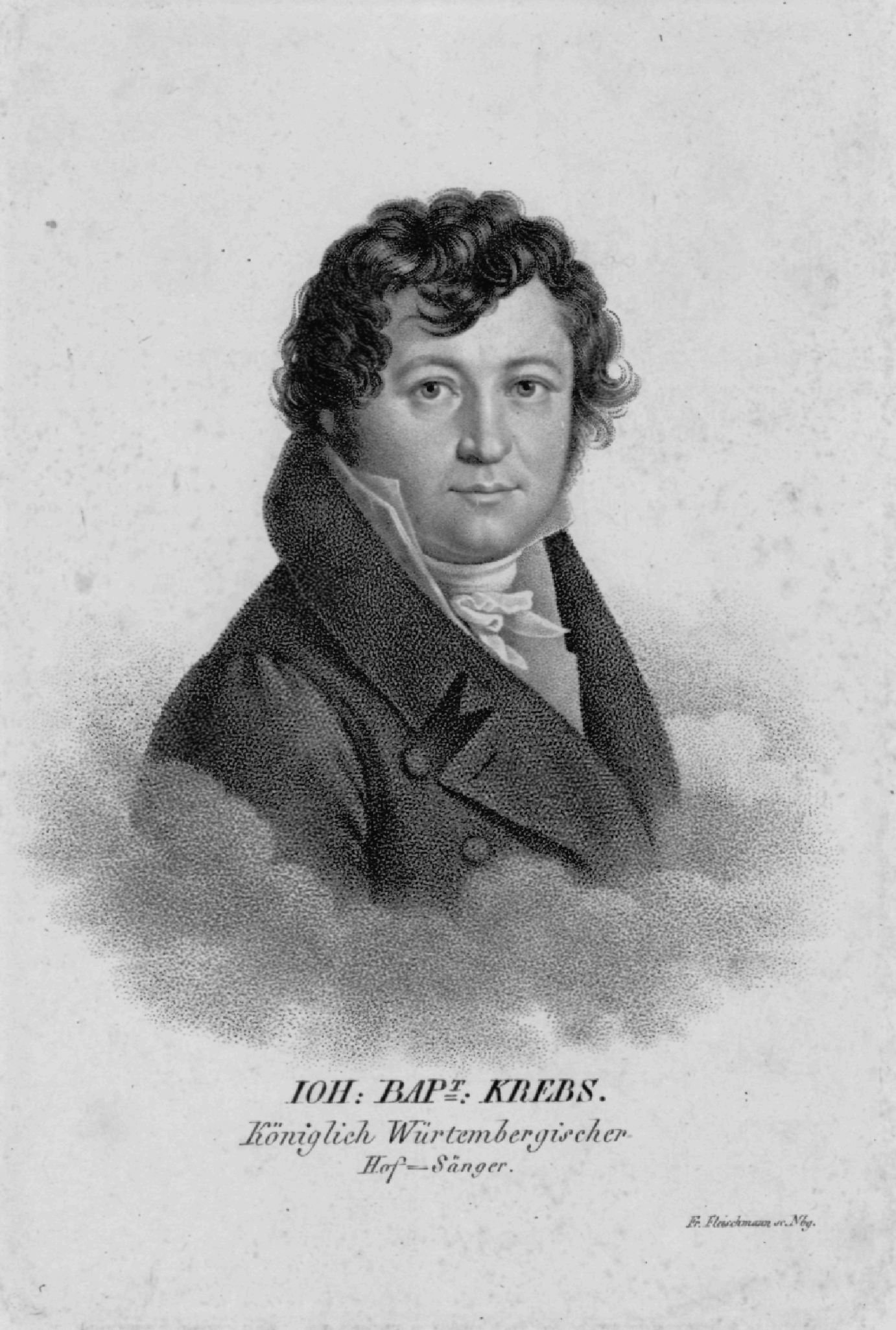 Portrait of Johann Baptist Krebs (1774-1851). Etching by Fridrich Fleischmann (1791-1834).